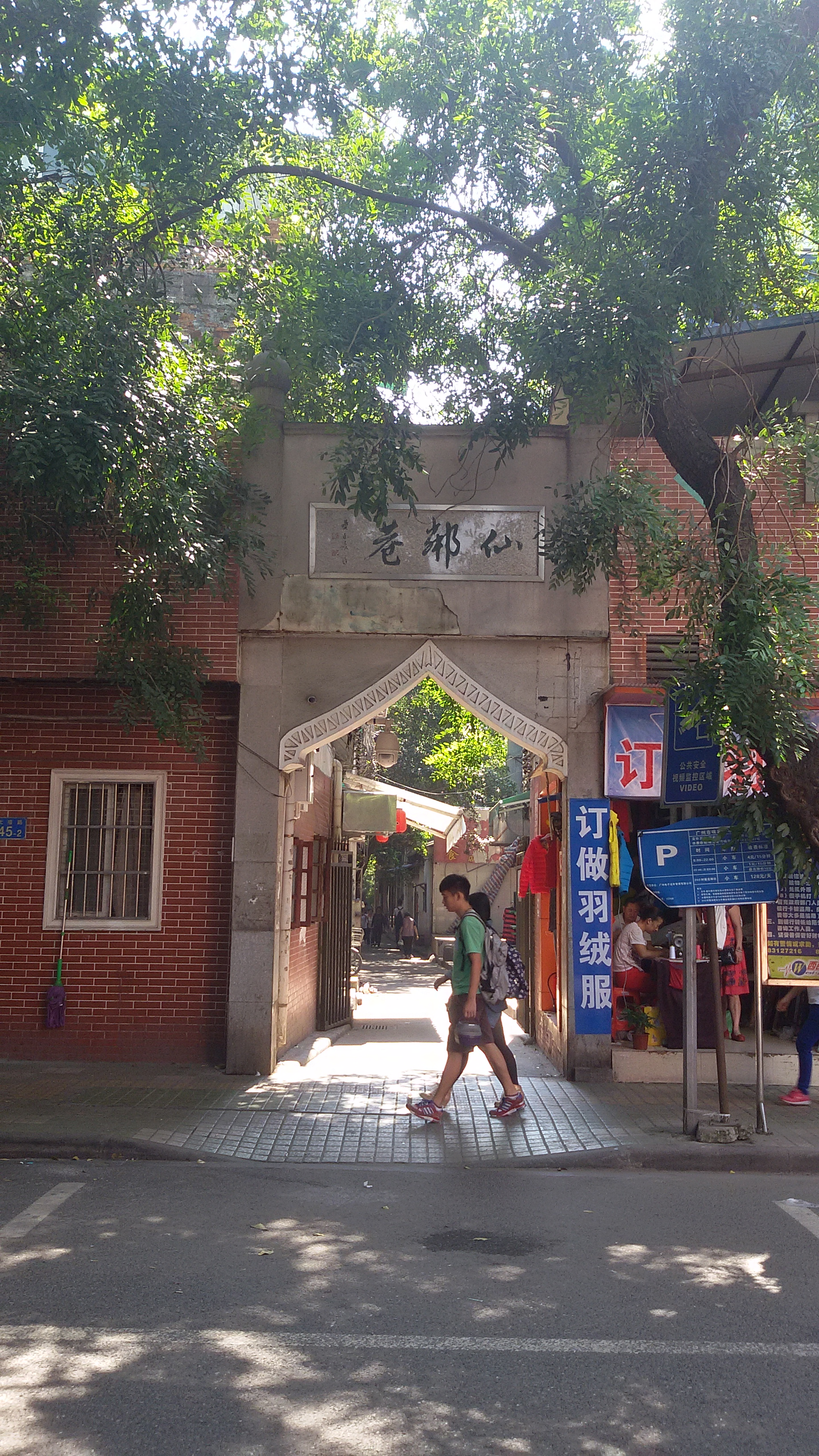 粵語: 仙鄰巷口嘅北邊牌坊，有啲似西亞嘅穆斯林建築噉。